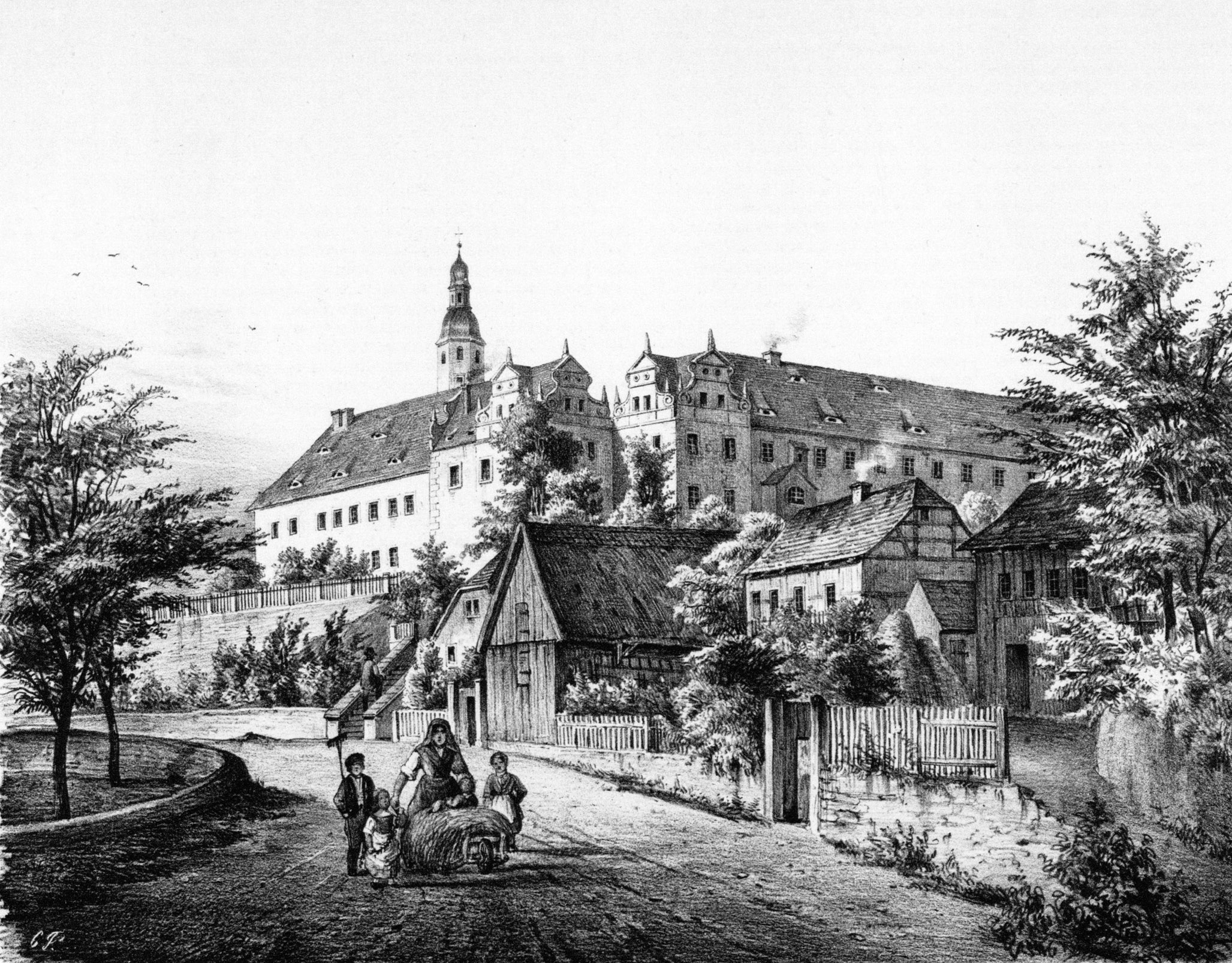 Schloß Schleinitz in: Album der Rittergüter und Schlösser im Königreiche Sachsen( nach Natur neu aufgenommen von F. Heise ... Mit historisch-statistisch bearb. Text hrsg. von G. A. Poenicke, Teil 2. Meissner Kreis.-Leipzig, ca 1856